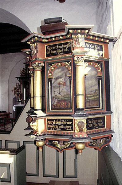 Kobberup Kirke, prædikestol